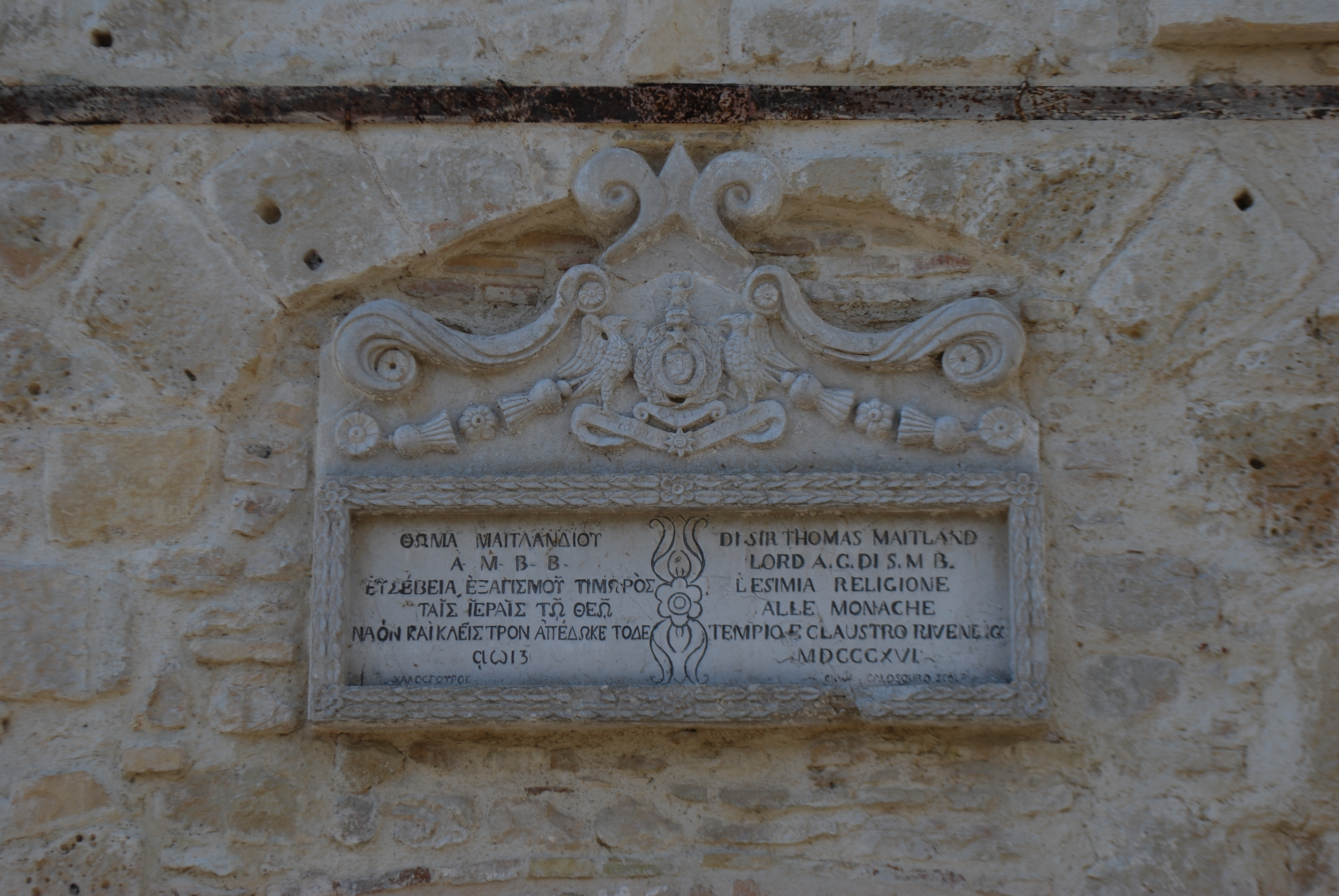 Vue de Corfou.